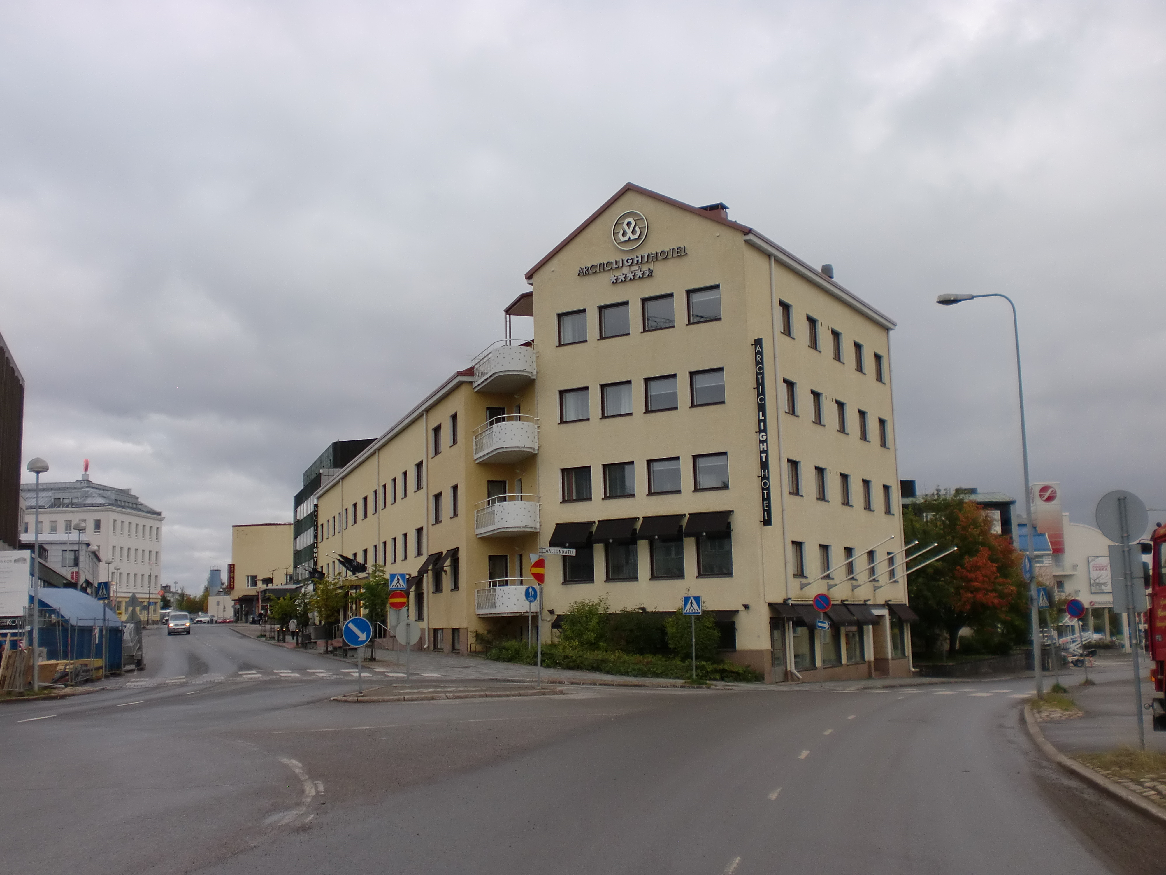 Ferdinand Salokankaan jälleenrakennusajan arkkitehtuuri Rovaniemellä; rakennettu kulttuuriympäristö Rovaniemellä